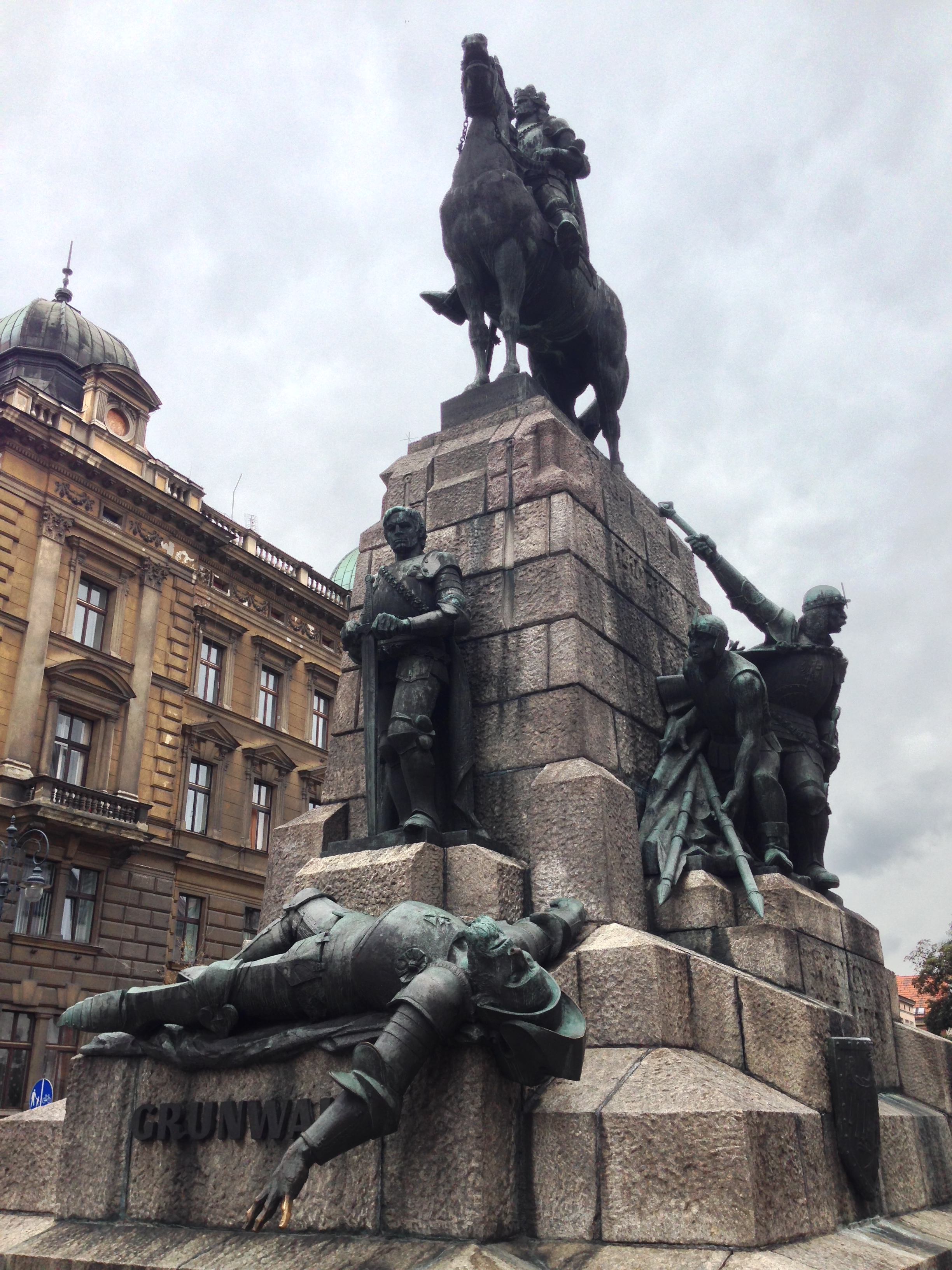 Grunwald in Krakow